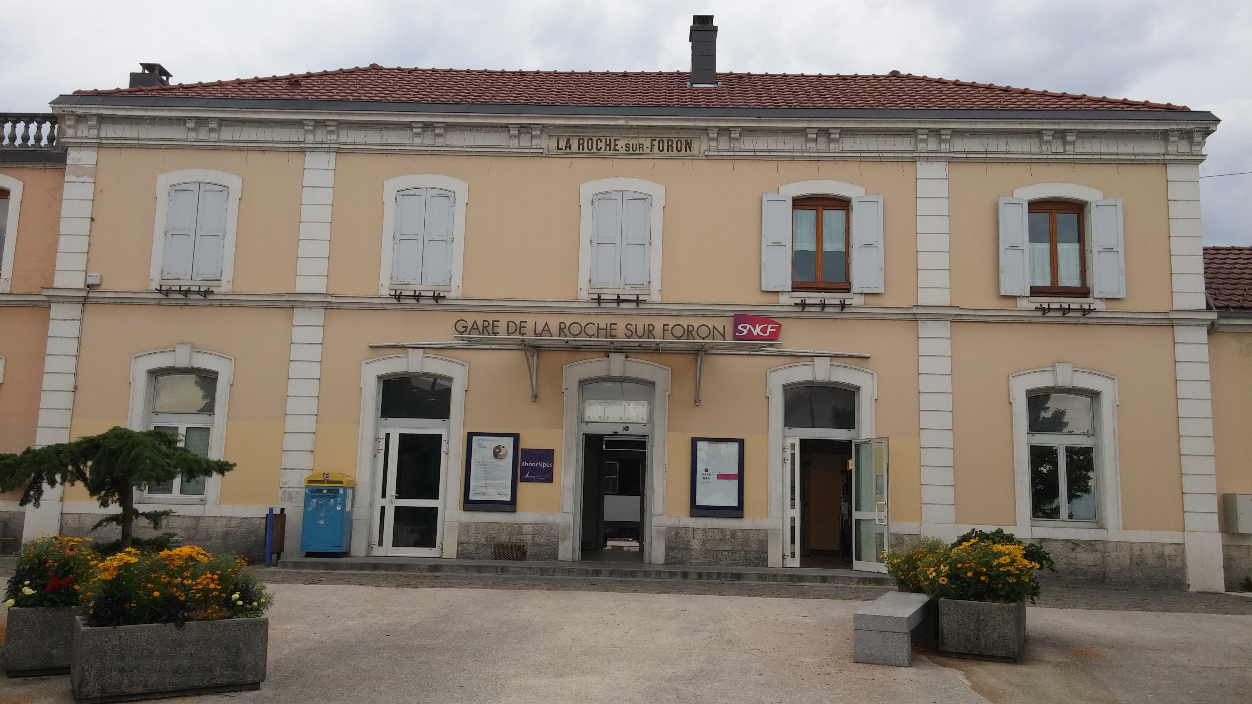 Bâtiment voyageur de la gare de La Roche-sur-Foron en 2015.